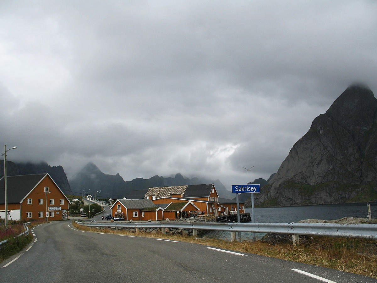 Isle of Sakrisøy, Lofoten, Norway